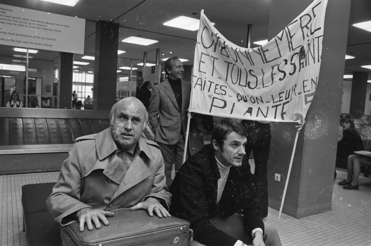 Lucien Leduc et Josip Skoblar à l'Aéroport d'Amsterdam-Schiphol pour le match Ajax Amsterdam-Olympique de Marseille.